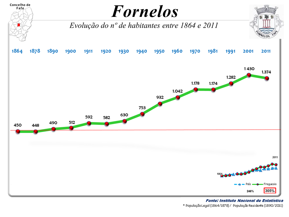 Censos 1864/2011